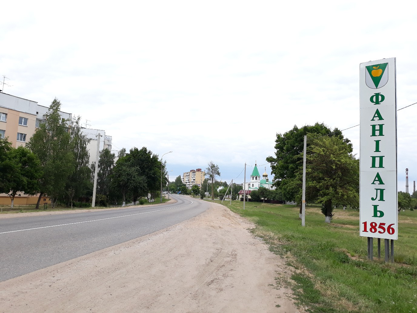 пачатак гарада з боку Дзяржынска